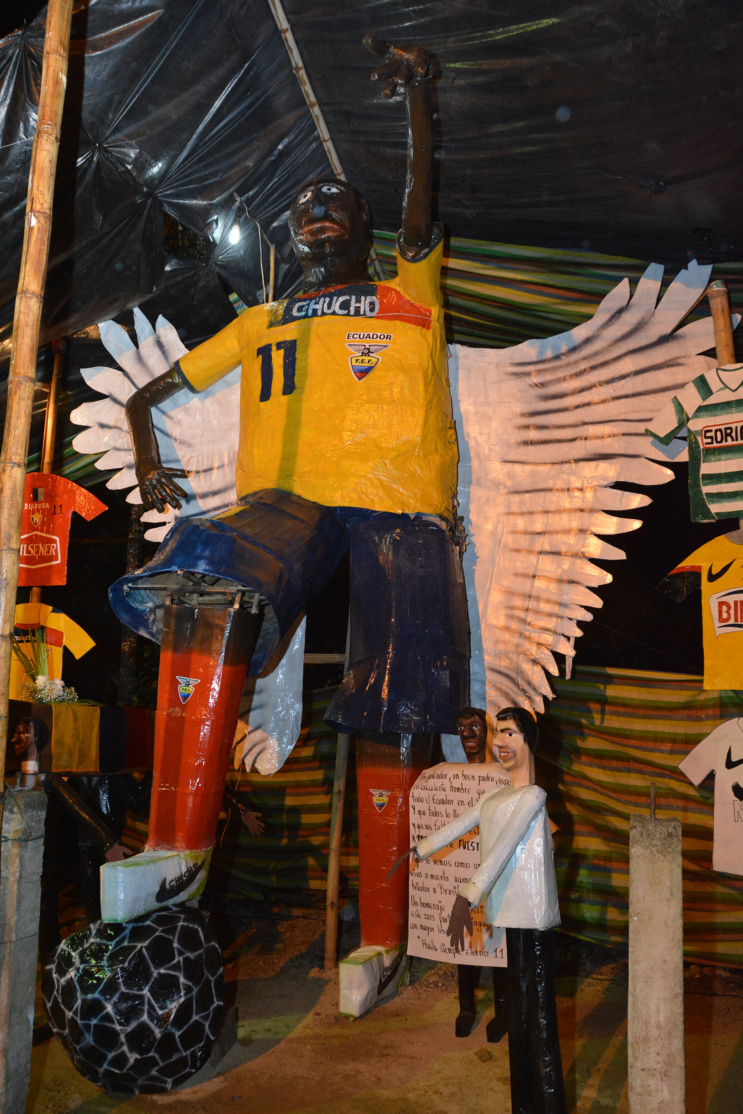 Concurso de años Viejos, 2013